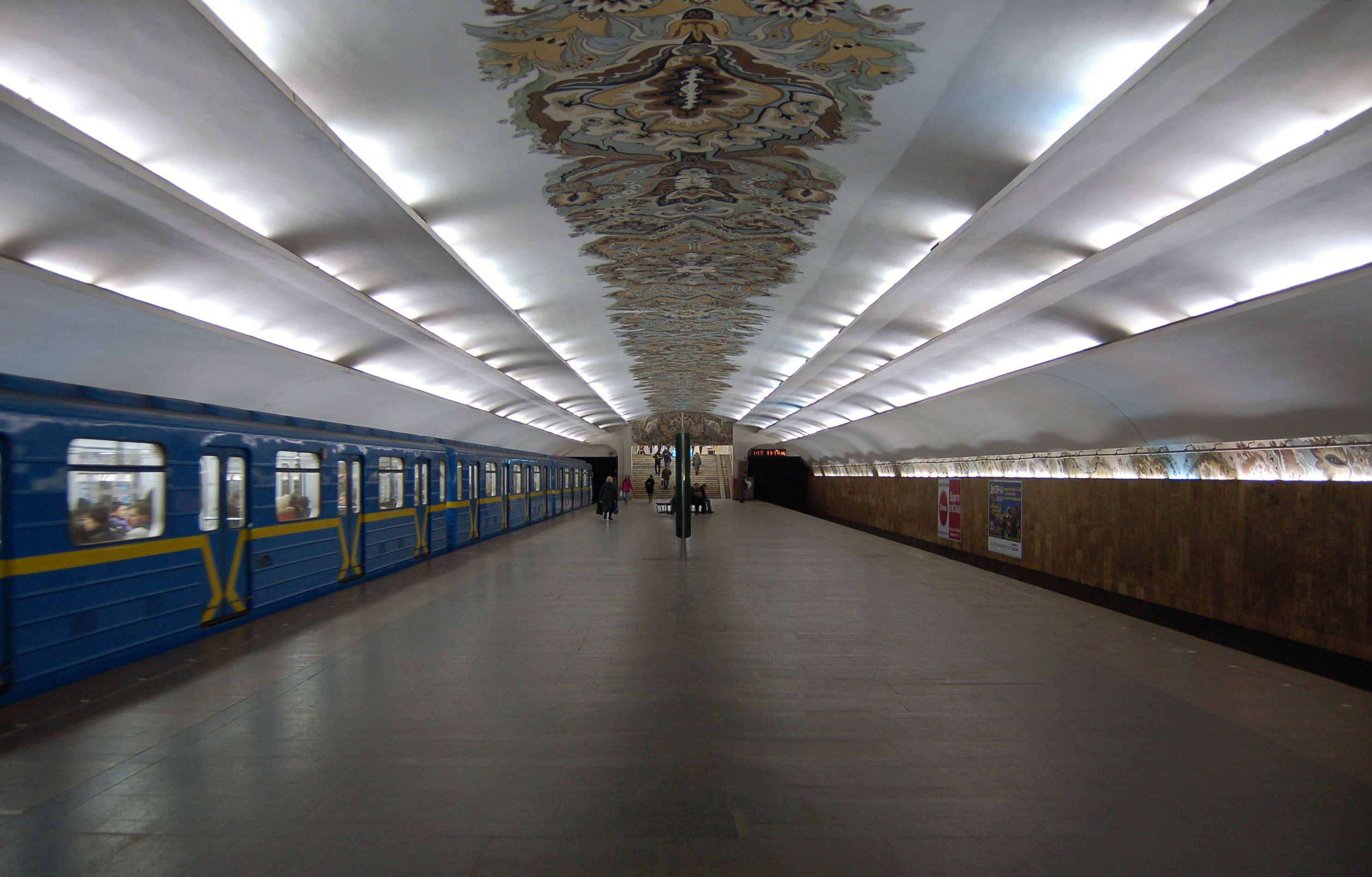 Cтанция метро «Минская»